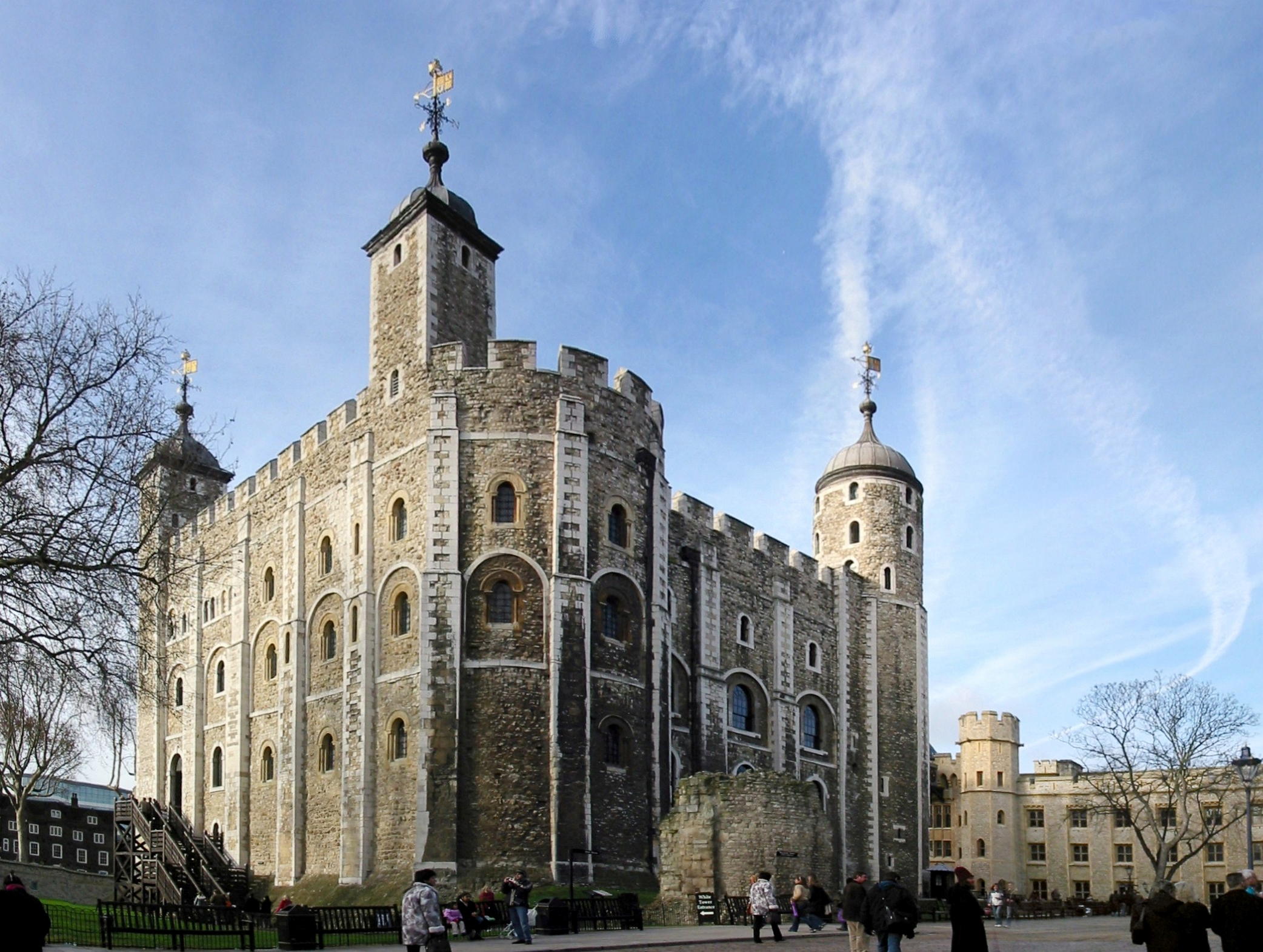 White Tower in London Bildbearbeitungen Von diesem Bild existieren die folgenden Bildbearbeitungen aus der Bilderwerkstatt: Image:London - White Tower2-2.jpg Image:London - White Tower2-3.jpg